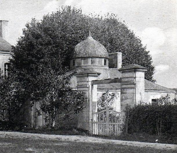 Chapelle où le Général de Lauberdière (1759-1837) est enterré. Château de l'Auberdière, commune de Bocé (49).